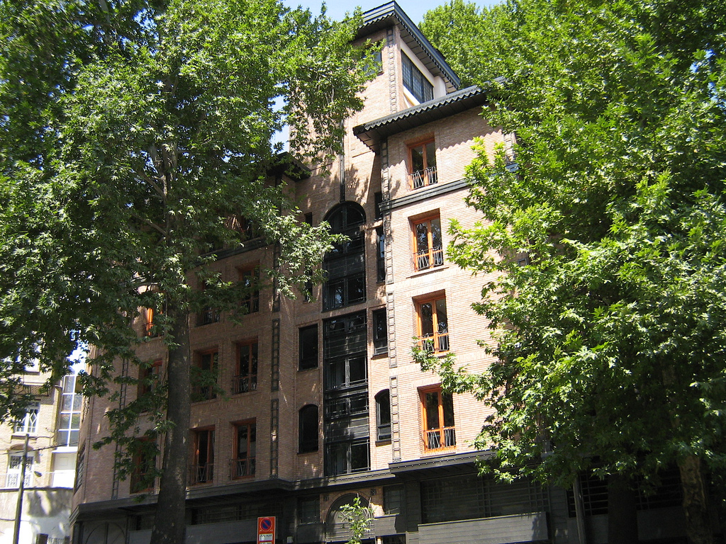 Une maison de Darband